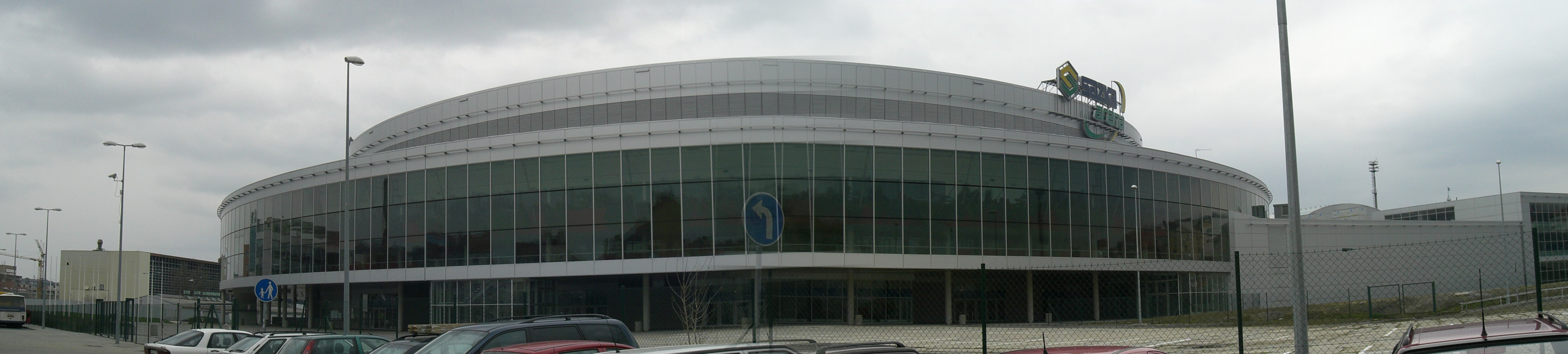 Sazka arena in Prague. By Zoner Panorama Maker